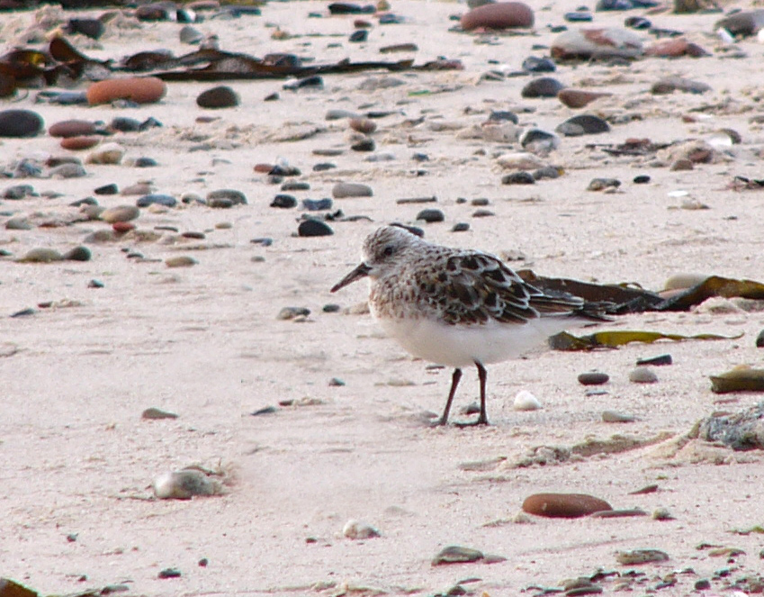 Calidris alba, Sanderling im Übergangskleid